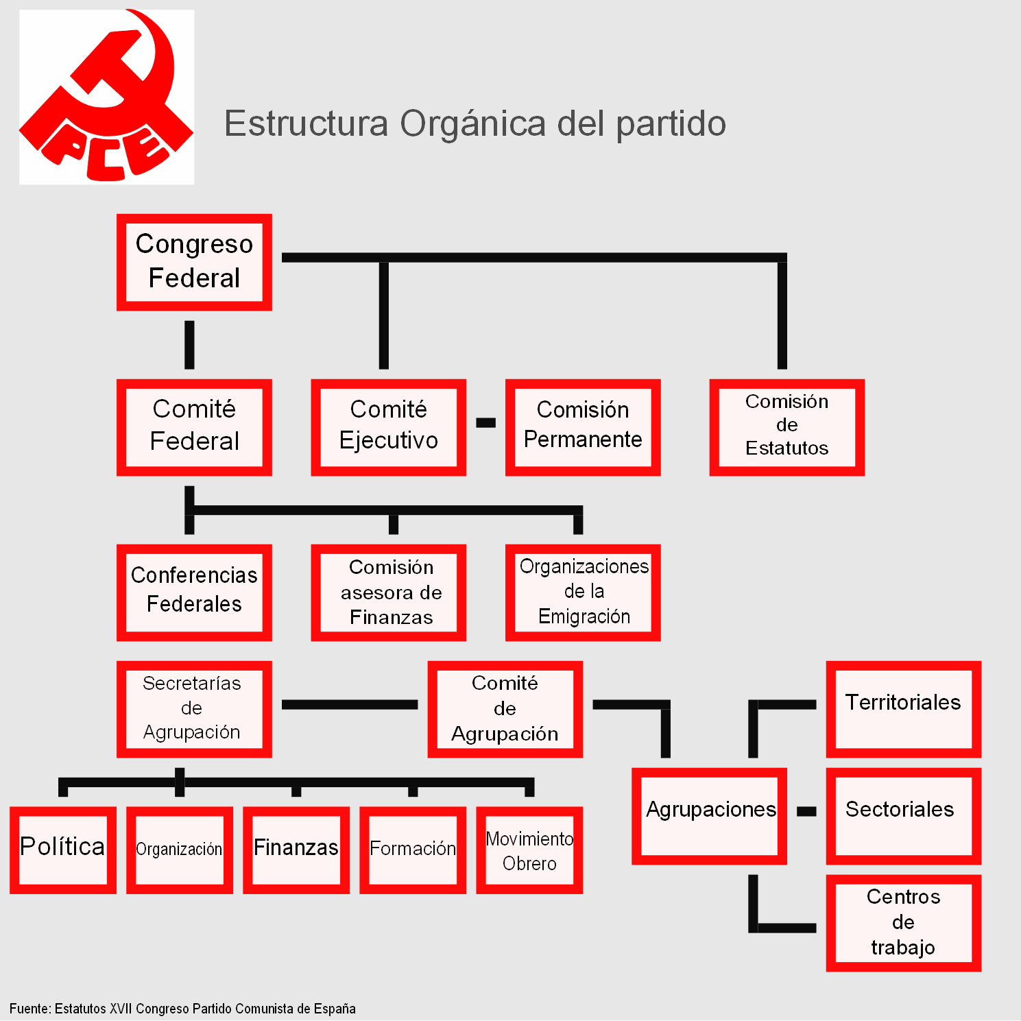 Estructura Orgánica del PCE. Fuente: Estatutos XVII Congreso del PCE